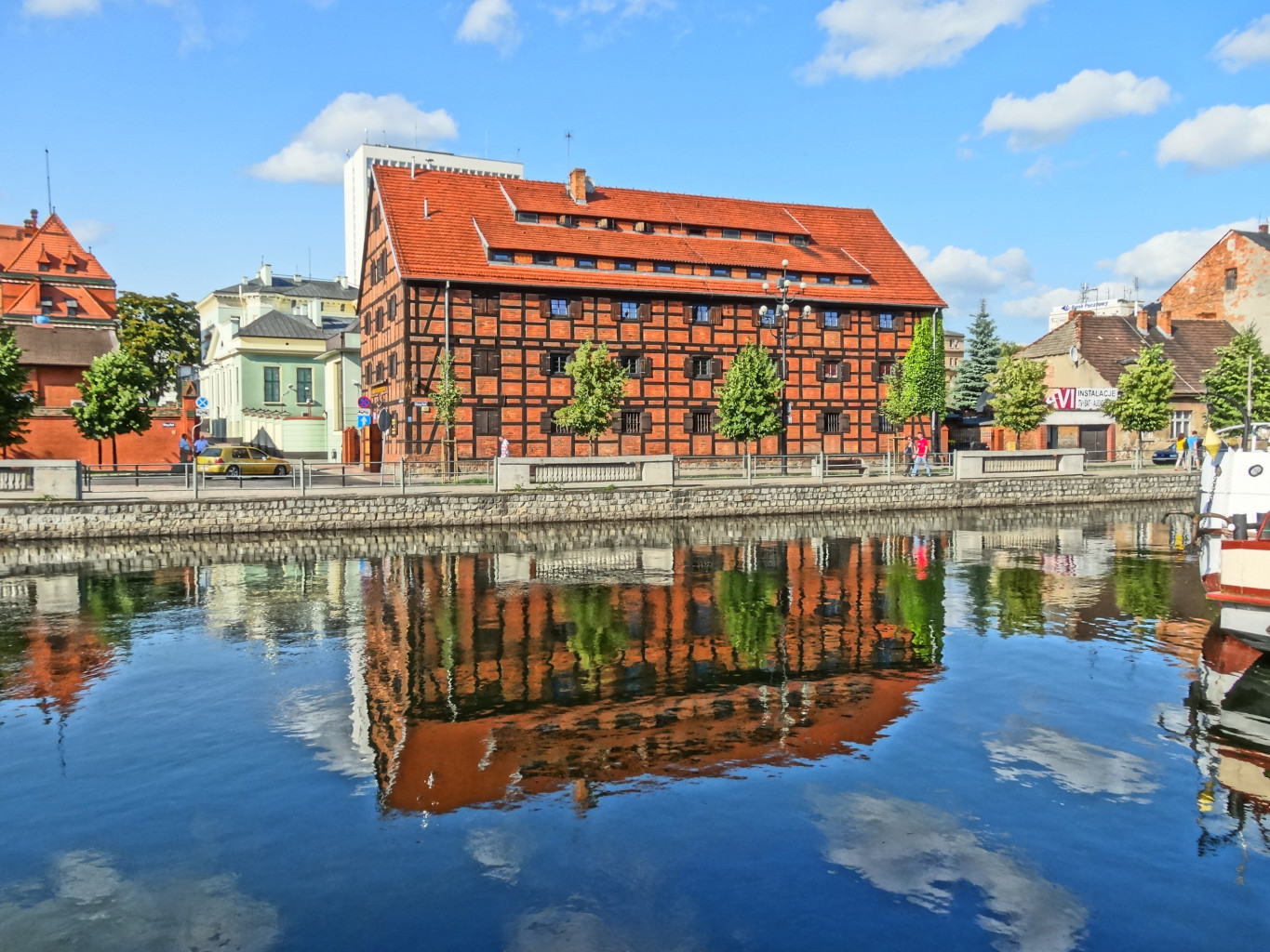 Spichlerz nad Brdą w Bydgoszczy przy ul. Stary Port zbud. w latach 30. XIX wieku